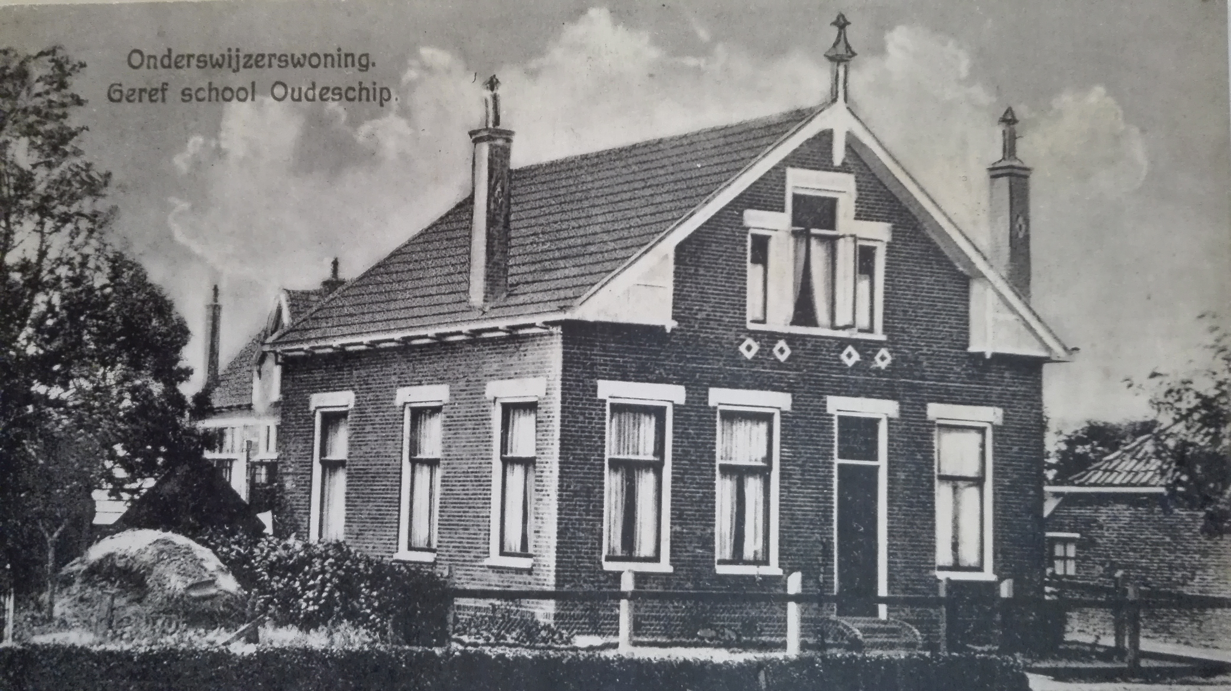 Oudeschip. Het woonhuis van het hoofd van de Gereformeerde Lagere School in de jaren '30 van de 20e eeuw.